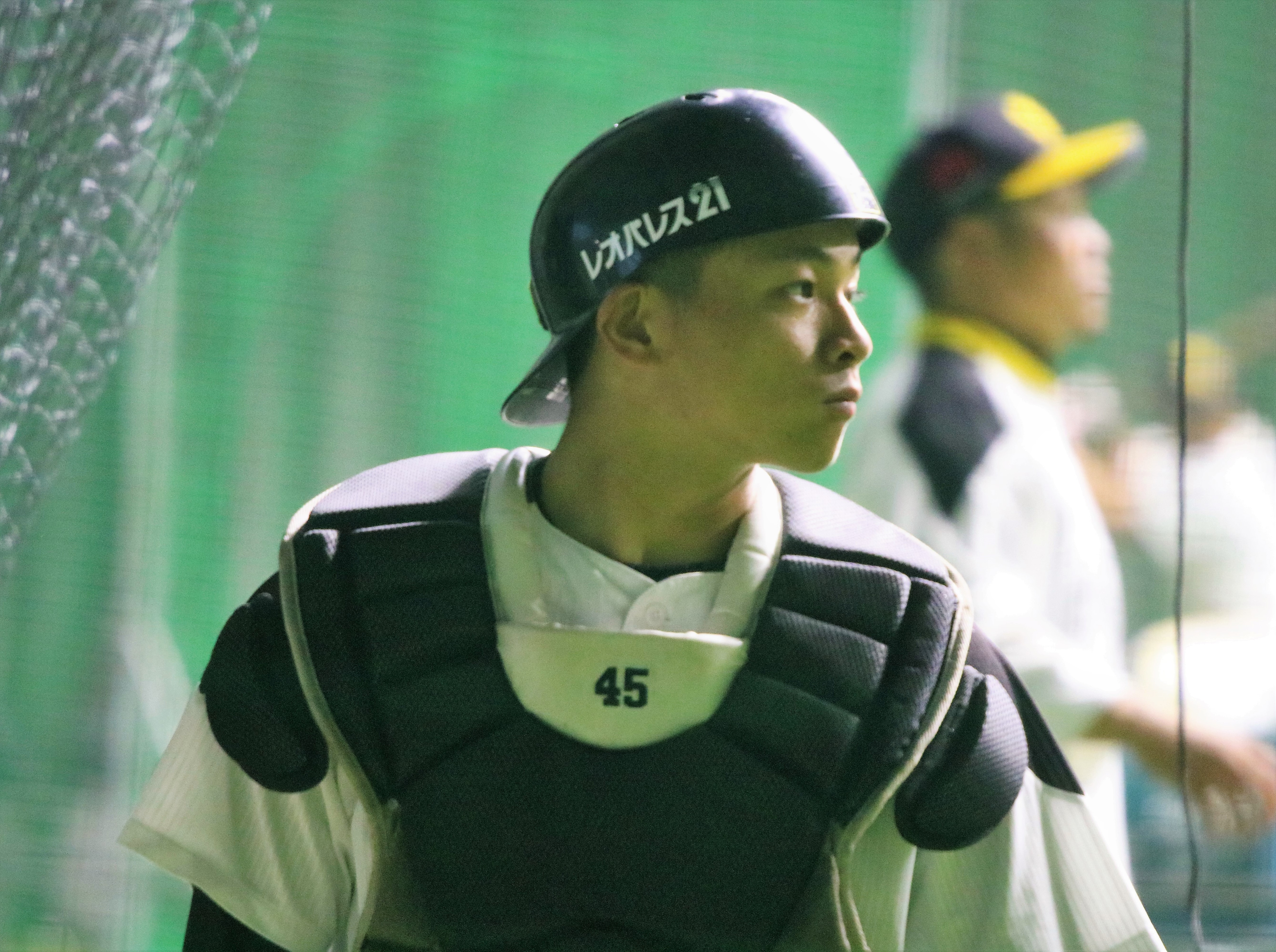 2018/4/6 タマホームスタジアム筑後 室内練習場